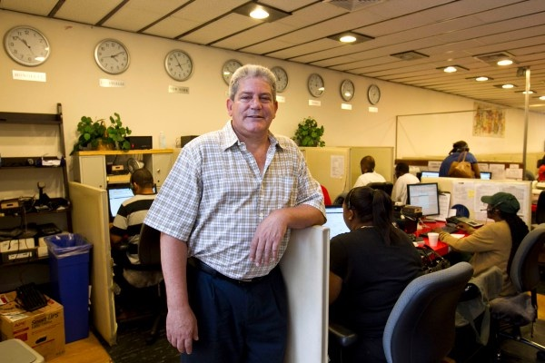 Avik Kabessa at CDC